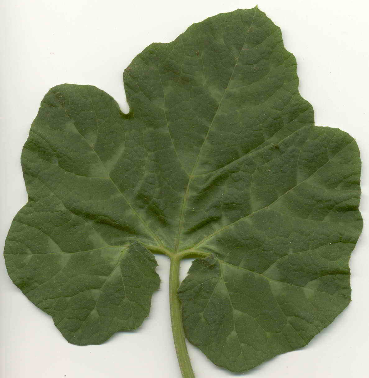 Escaneada